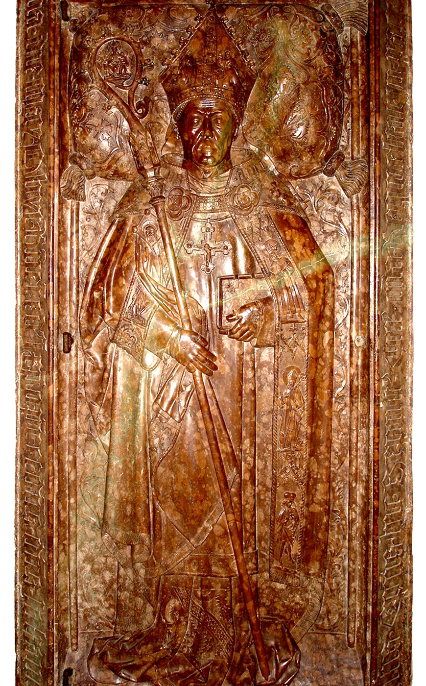 Epitaph Johannes Tulbeck, Nordturmkapelle